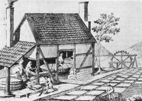 Zeichnung von Friedrich Christoph Müller: Bleicherei in Schwelm